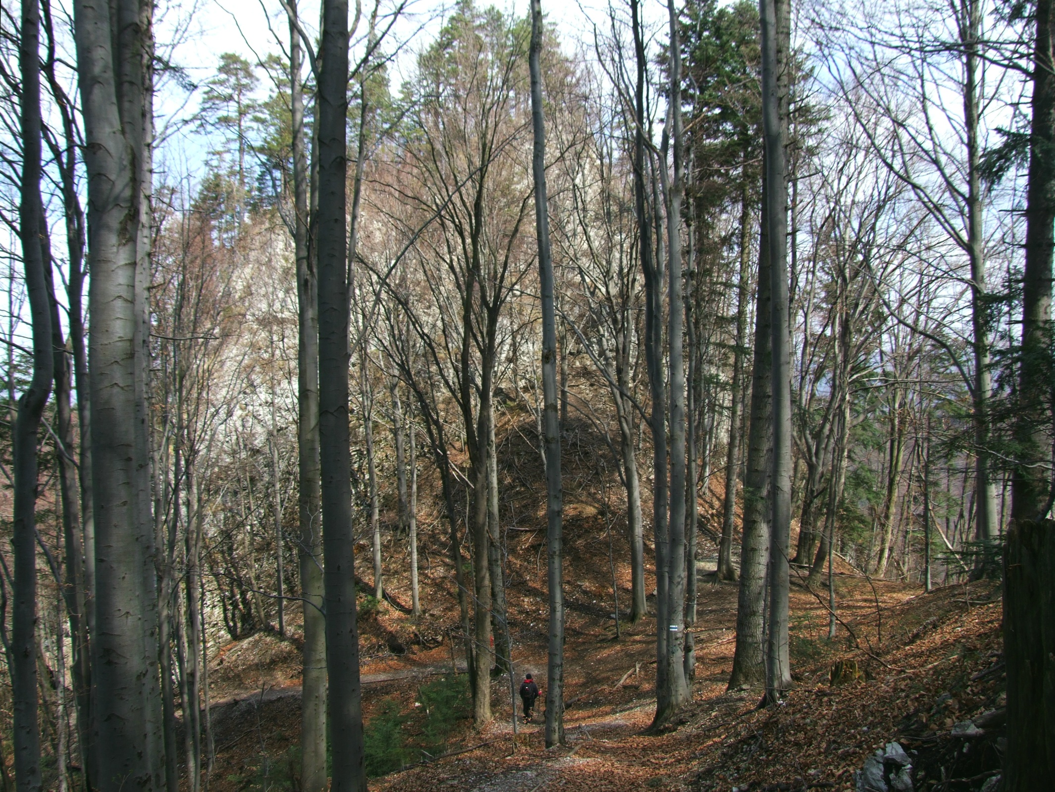 Zamkowa Przełęcz w Pieninach